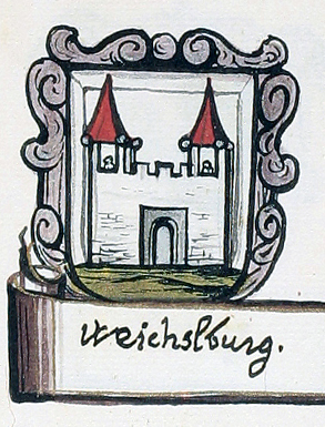 Grb mesta Višnja Gora, avtor: Valvasor